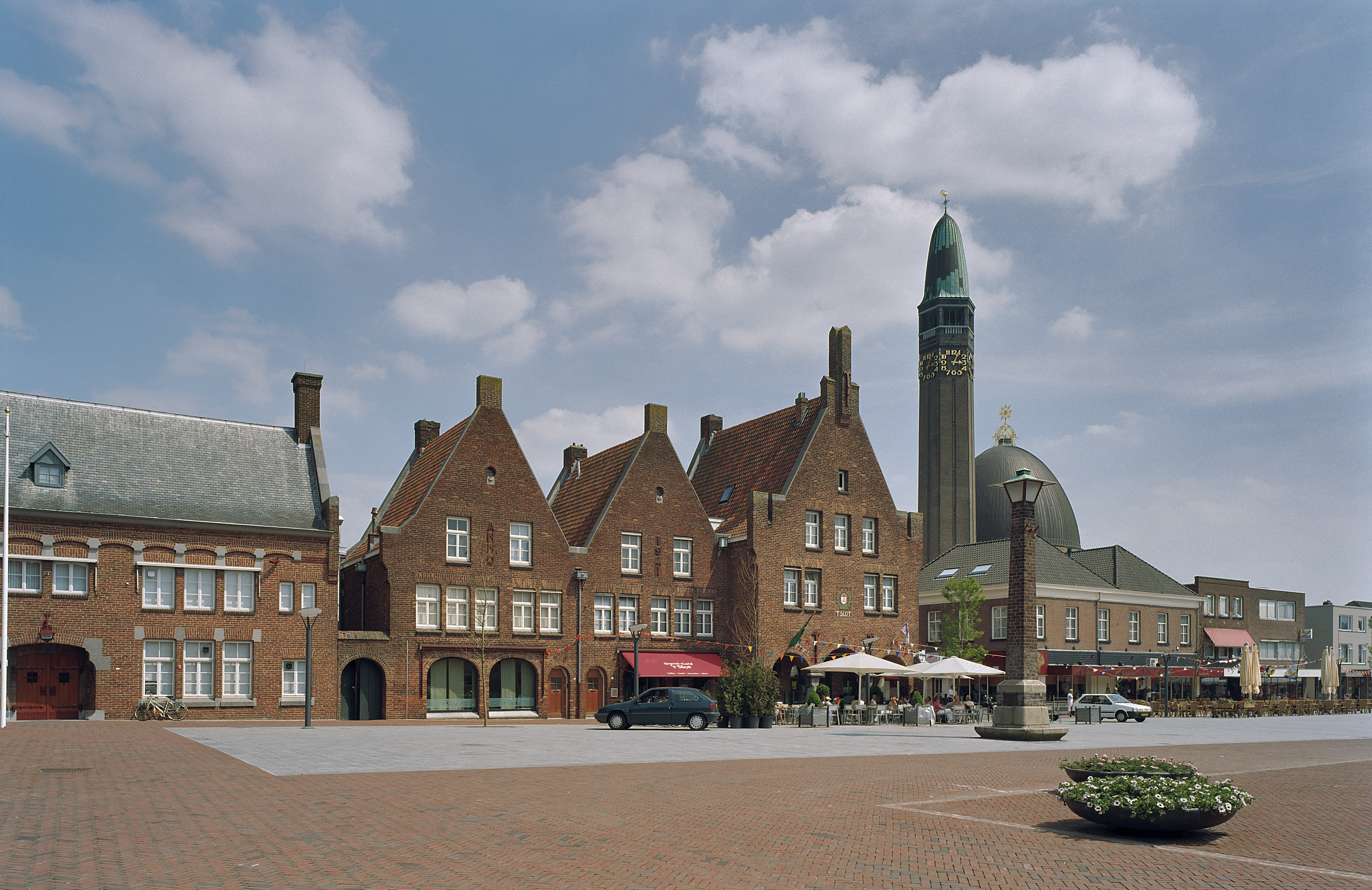 Raadhuis: Overzicht rechter zijgevels met plein en rechts de Rooms katholieke kerk Jan de Doper (opmerking: exterieur foto's opgenomen in maart PLUS juni 2004 (niet aangegeven welke wanneer))